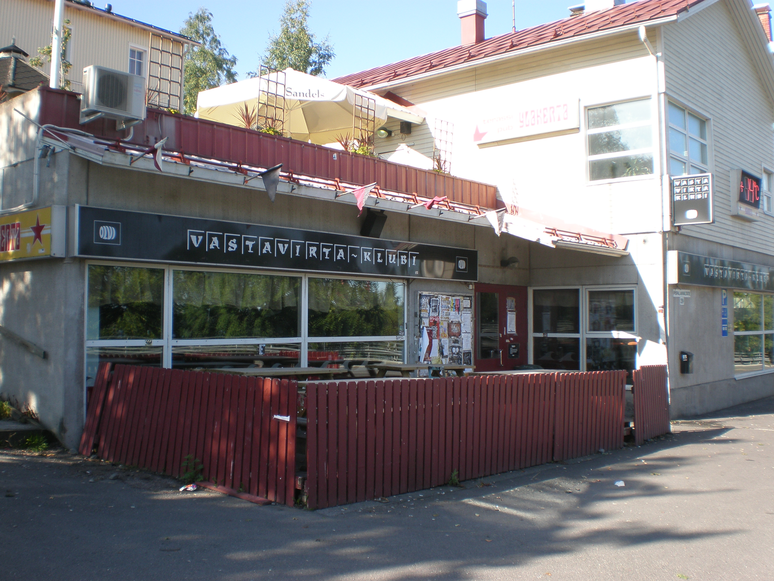 Vastavirta-Klubi